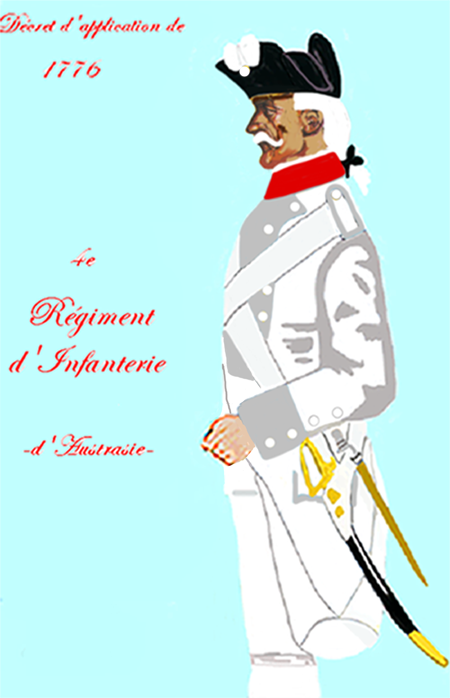 Uniforme d' un régiment d' infanterie royale de 1776 à 1779 (France) . De: „LES UNIFORMES ET LES DRAPEAUX DE L'ARMÉE DU ROI“ Marseille 1899.